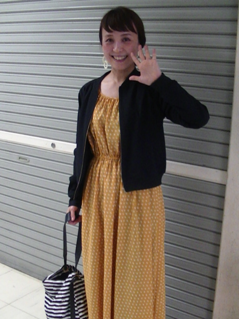 加藤誉子 (2018年4月)